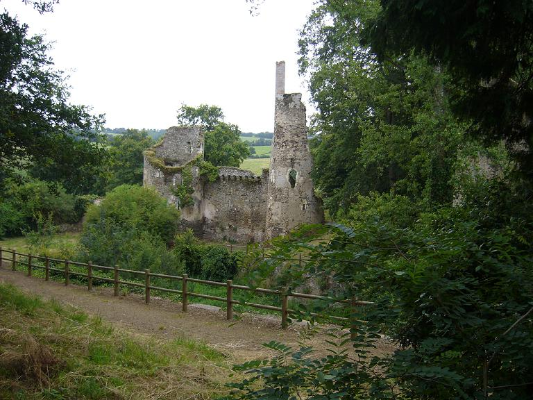 Ruines du château de Joachim du Bellay à Liré en Anjou.